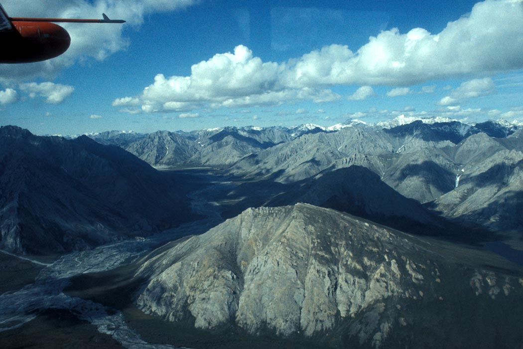 upper Ivishak River valley, Alaska